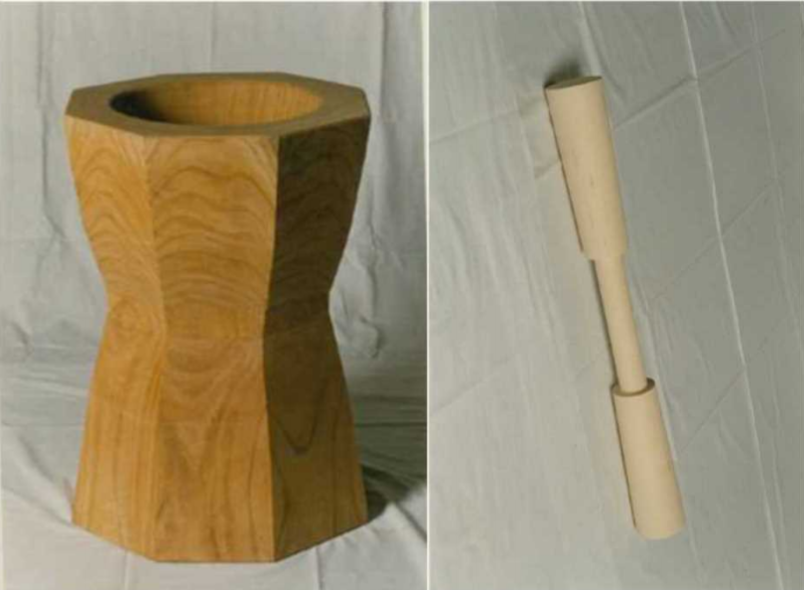 臼と杵（いずれも大嘗祭用）